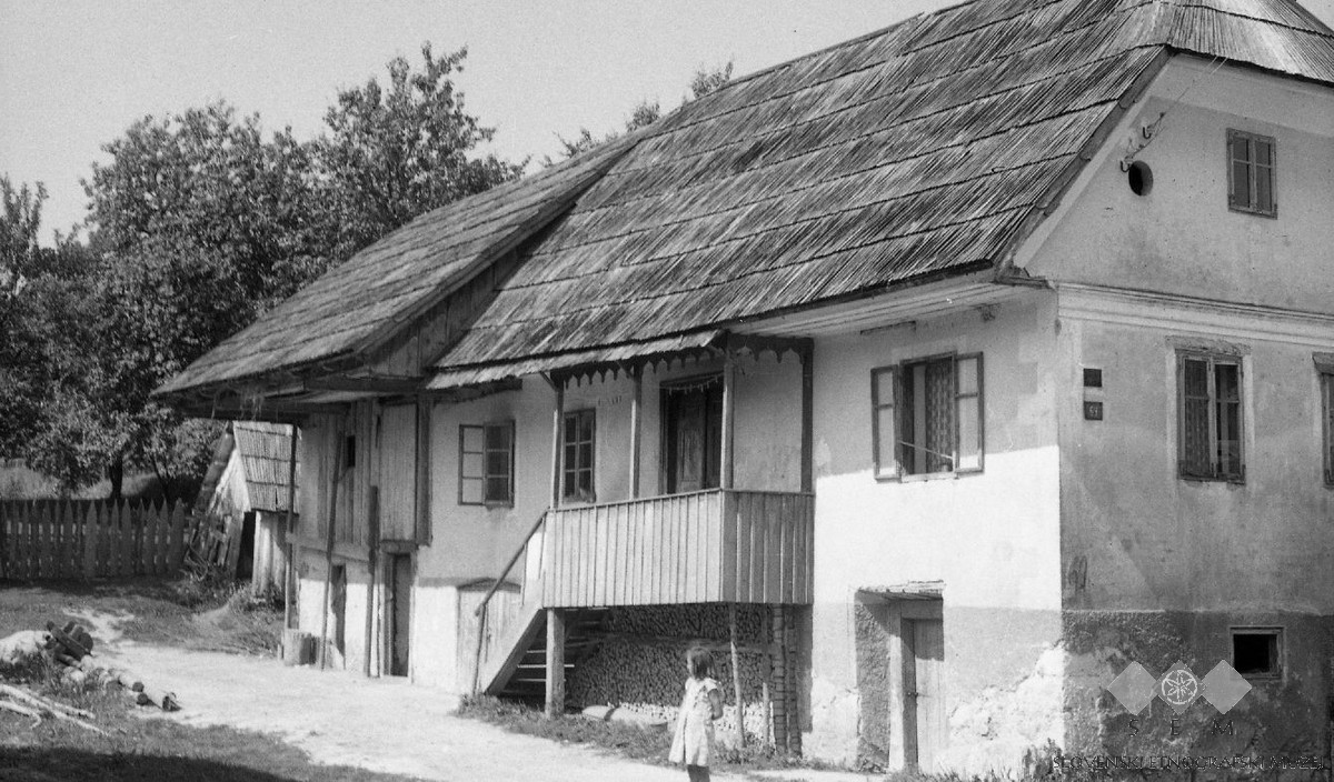 Hiša, krita s "šindrami" v Prezidu.